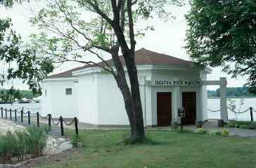 Descrição: Parque Estadual e Museu da Pedra de Dighton, USA. Fonte/Créditos: Fotografias Imagens ilustrações do usuário registrado. (Não protegidos por copyright). Igualmente provenientes da minha Webpage " Les Photos du Grand-Lancy " " À la Découverte du Monde..." (Não protegidos por copyright). Licença: (Não protegidos por copyright). JM 22:17, 22 Outubro 2005 (UTC)